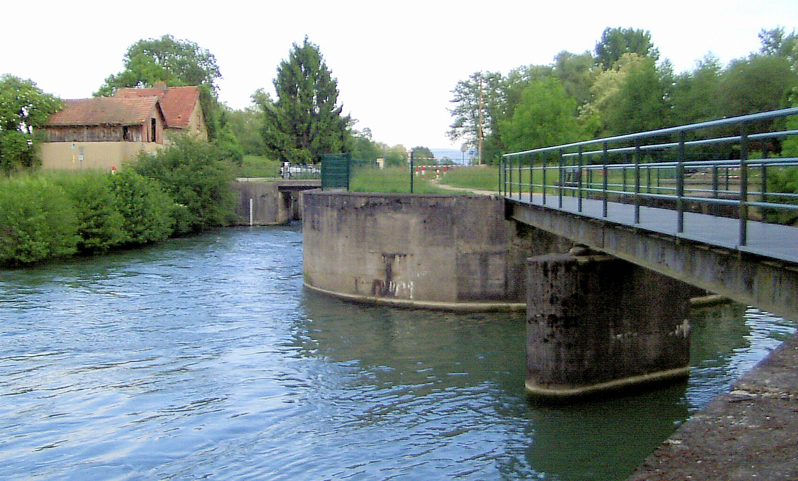 L'ancien ecluse de Canal de Huningue à Saint-Louis